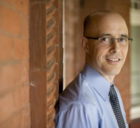 Jim Tucker